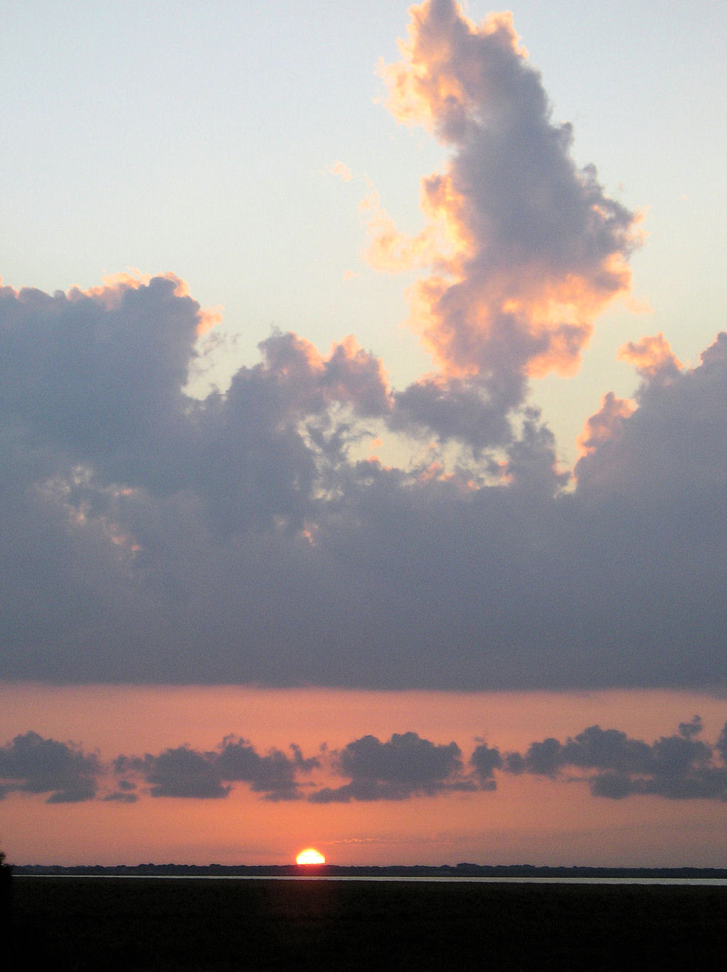 Ocaso en las marismas del Guadalquivir en Sanlúcar de Barrameda (Cádiz, Andalucía, España)